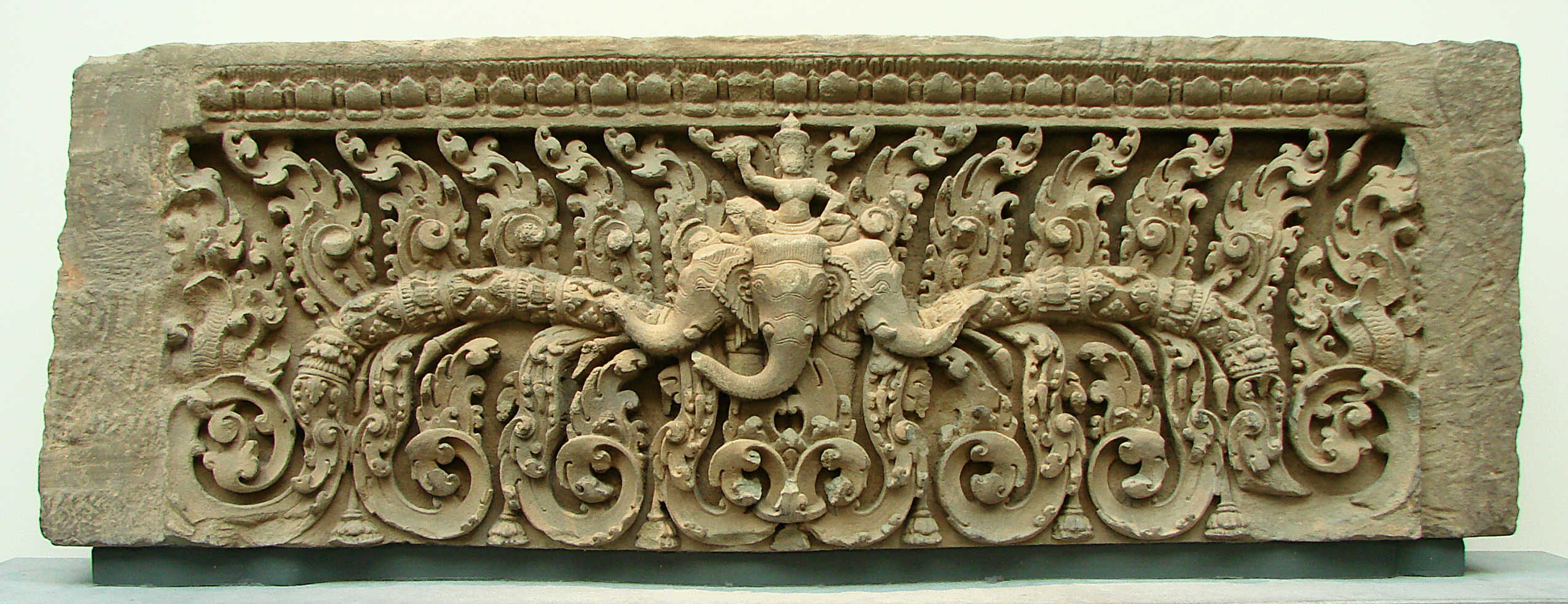 Linteau. Provenance exacte inconnue, style de Pre Rup, fin du 10ème siècle. Au centre: Indra, dieu de l'orage, chevauchant l'éléphant tricéphale Airavana et brandissant la foudre. Musée Guimet,Paris.